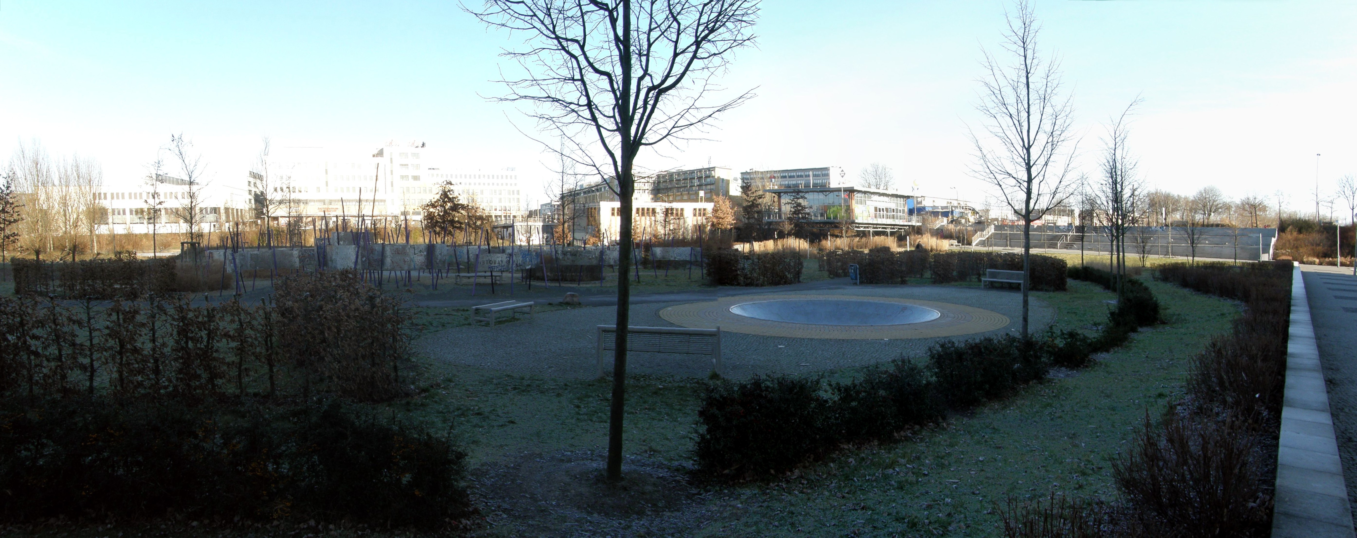 Berlin-Hellersdorf, Regine-Hildebrandt-Park